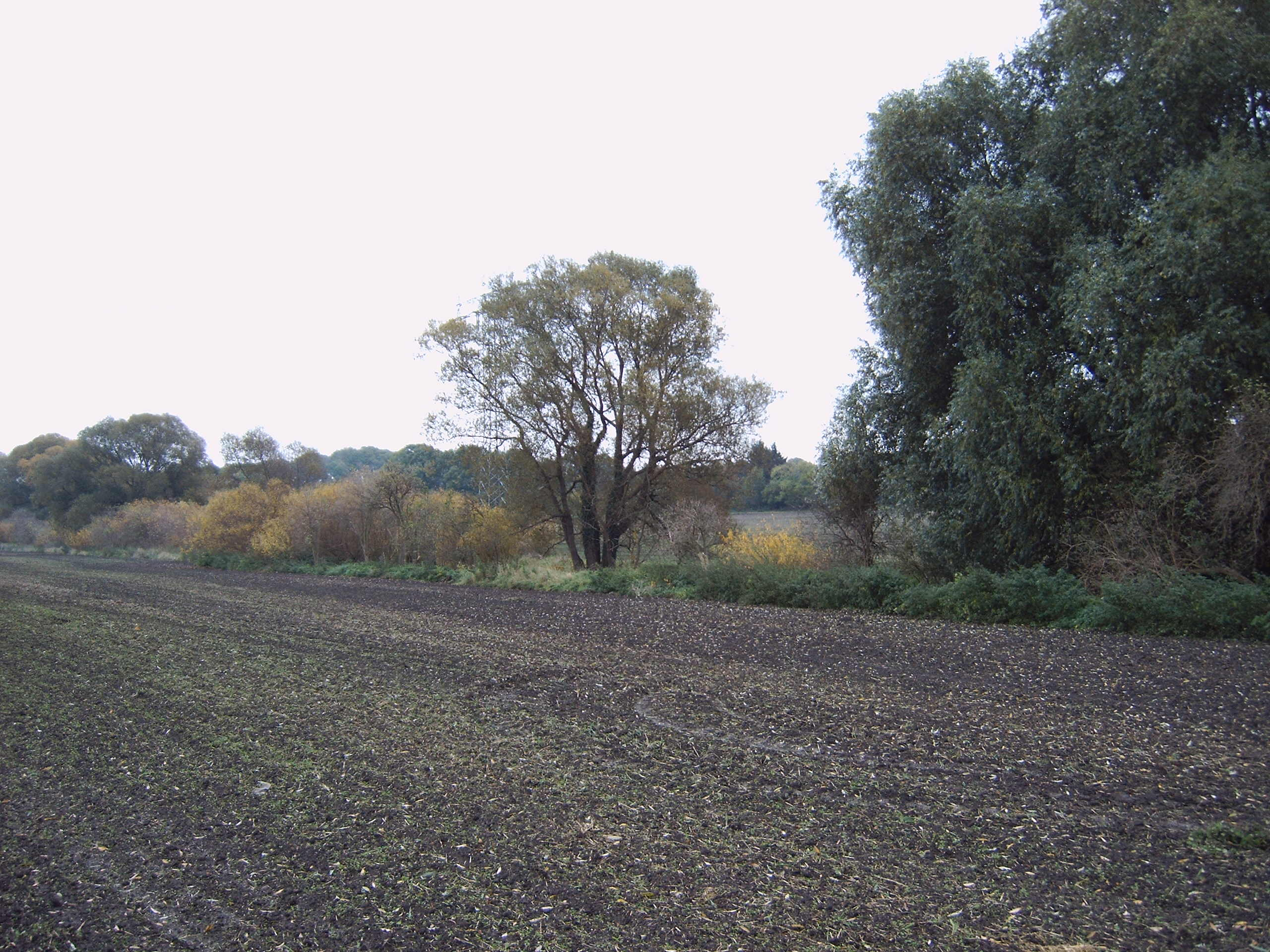 Stelle des ehemaligen Ortes Niendorf, nördlich von Klein Ottersleben bei Magdeburg, Bild aufgenommen am 24.10.2005 von Olaf2